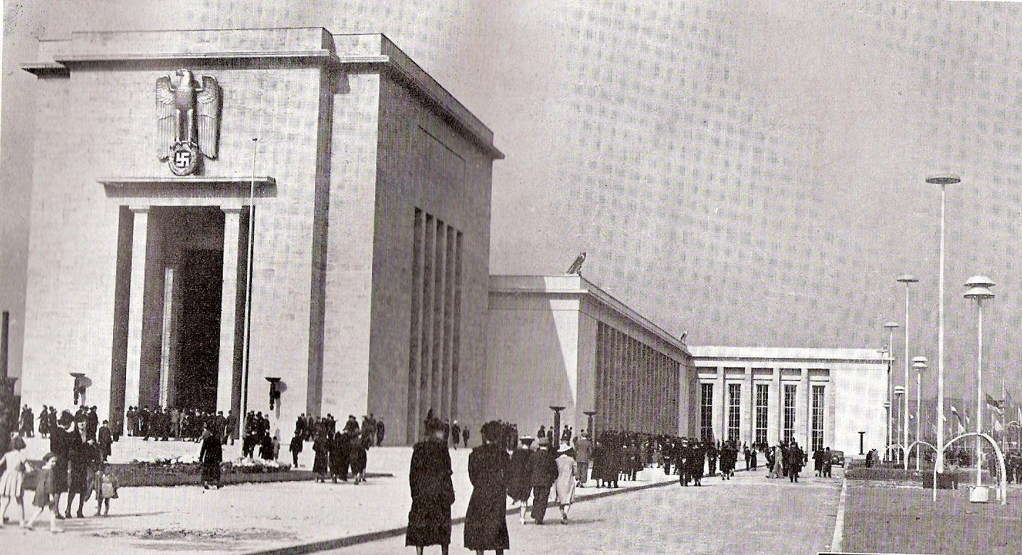 Le palais de l'Allemagne de l'architecte Fahrenkamp à l'exposition internationale de Liège de 1939.